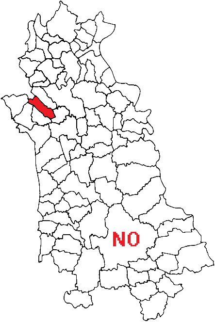 Mappa con posizione del comune nella provincia italiana di Novara